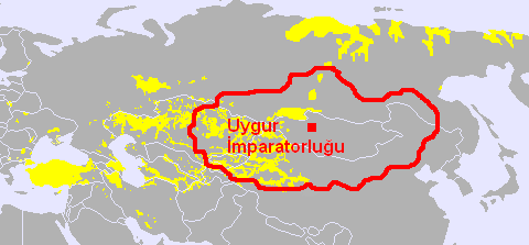 Uygurlar